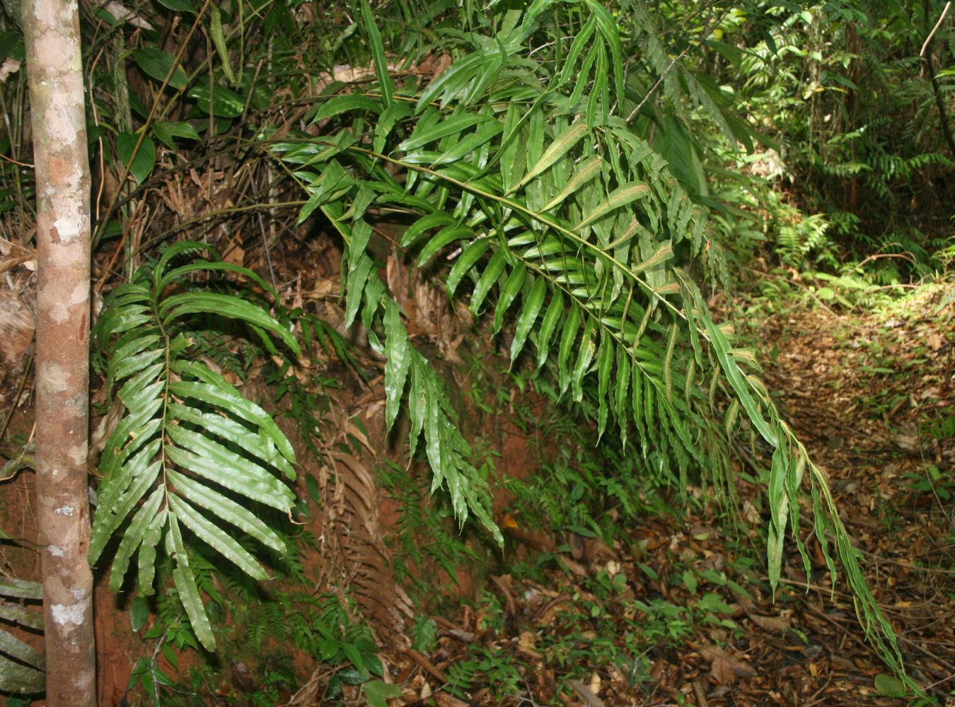 Metaxya rostrata, Metaxyaceae - Costa Rica: Prov. Puntarenas, La Gamba NW Golfito, "Fila Trail" S "Tropenstation La Gamba"/"Estación Biológica La Gamba"